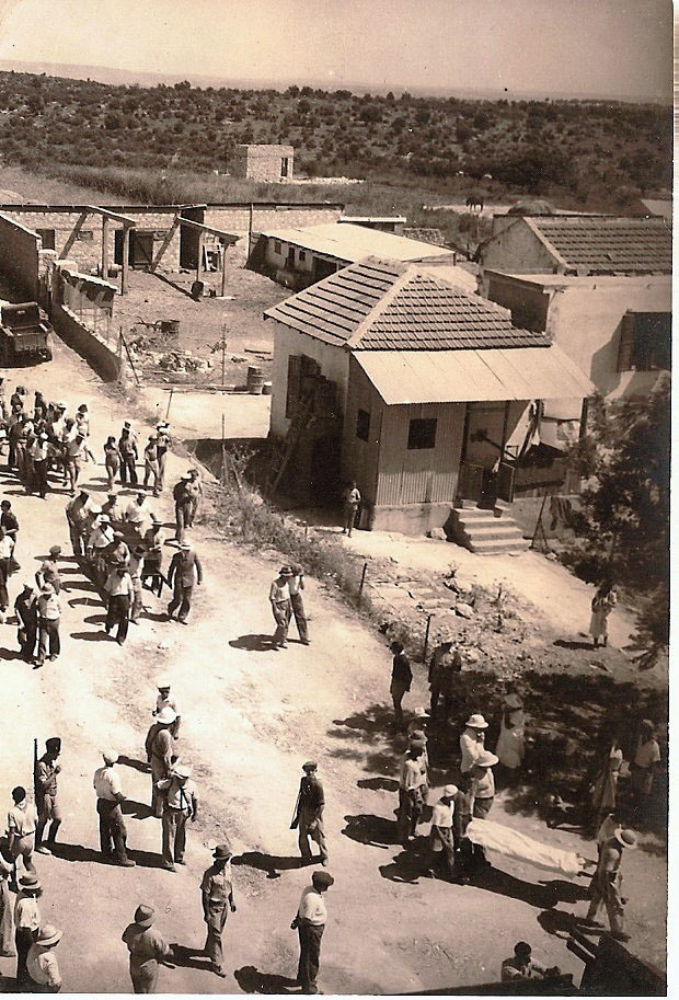 גבעת עדה הלווית הרוגי מאורעות 1936, מסע ההלוויה עובר בסמטה בין בית אפרתי לבית הכנסת המרכזי. Original Image Name:גבעת עדה הלווית הרוגי מאורעות 1936, נוסח הקרדיט:גבעת עדה עמותת דורות ארכיון המושבה